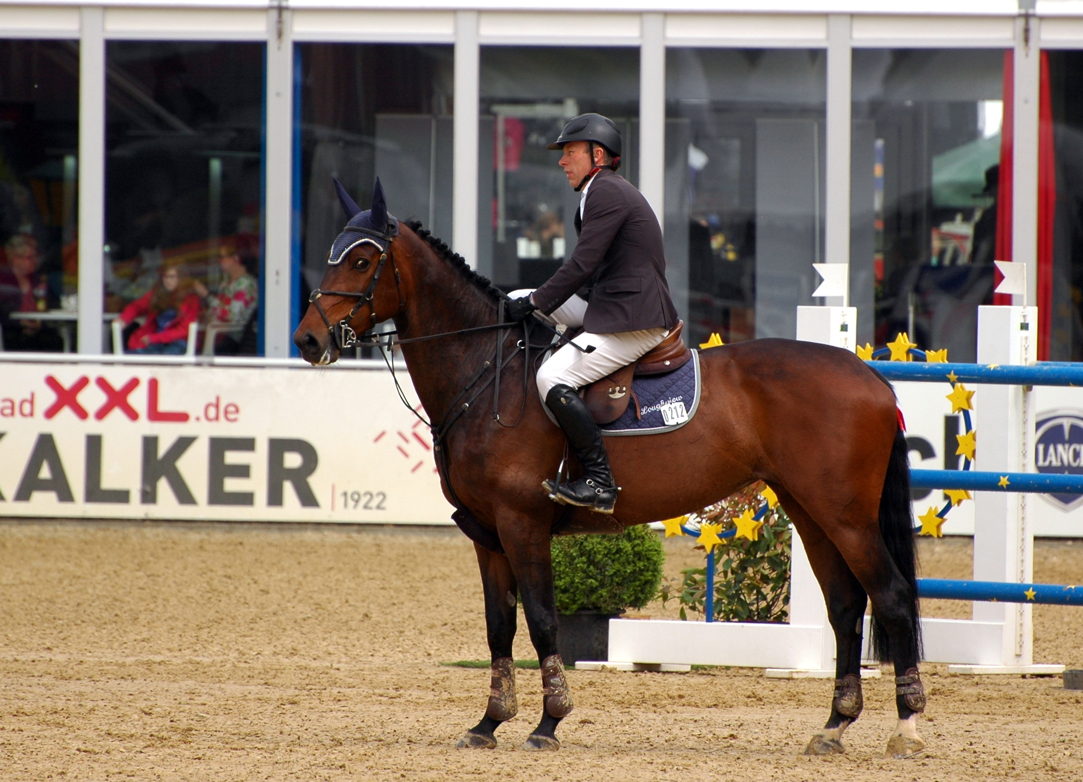 52. Maimarkt-Turnier